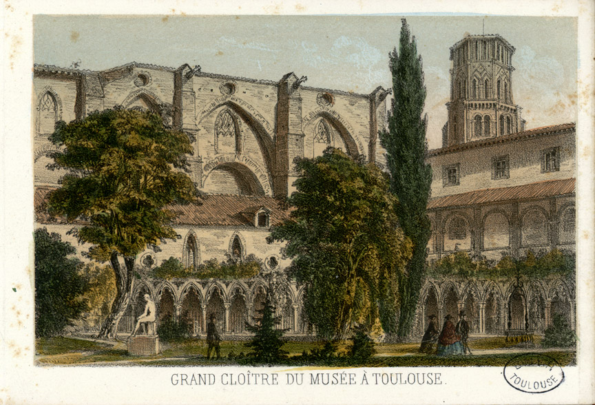 dessinées et lithographiées par Mercereau, aquarellées en couleurs et gommées. Sur le contreplat étiquette du libraire : Auguste Bassy à Pau